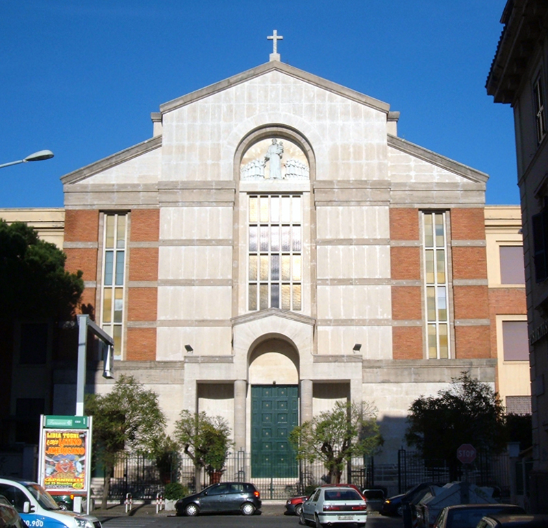 Chiesa di Sant'Antonio da Padova a Circonvallazione Appia, a Roma, nel quartiere Appio Latino.